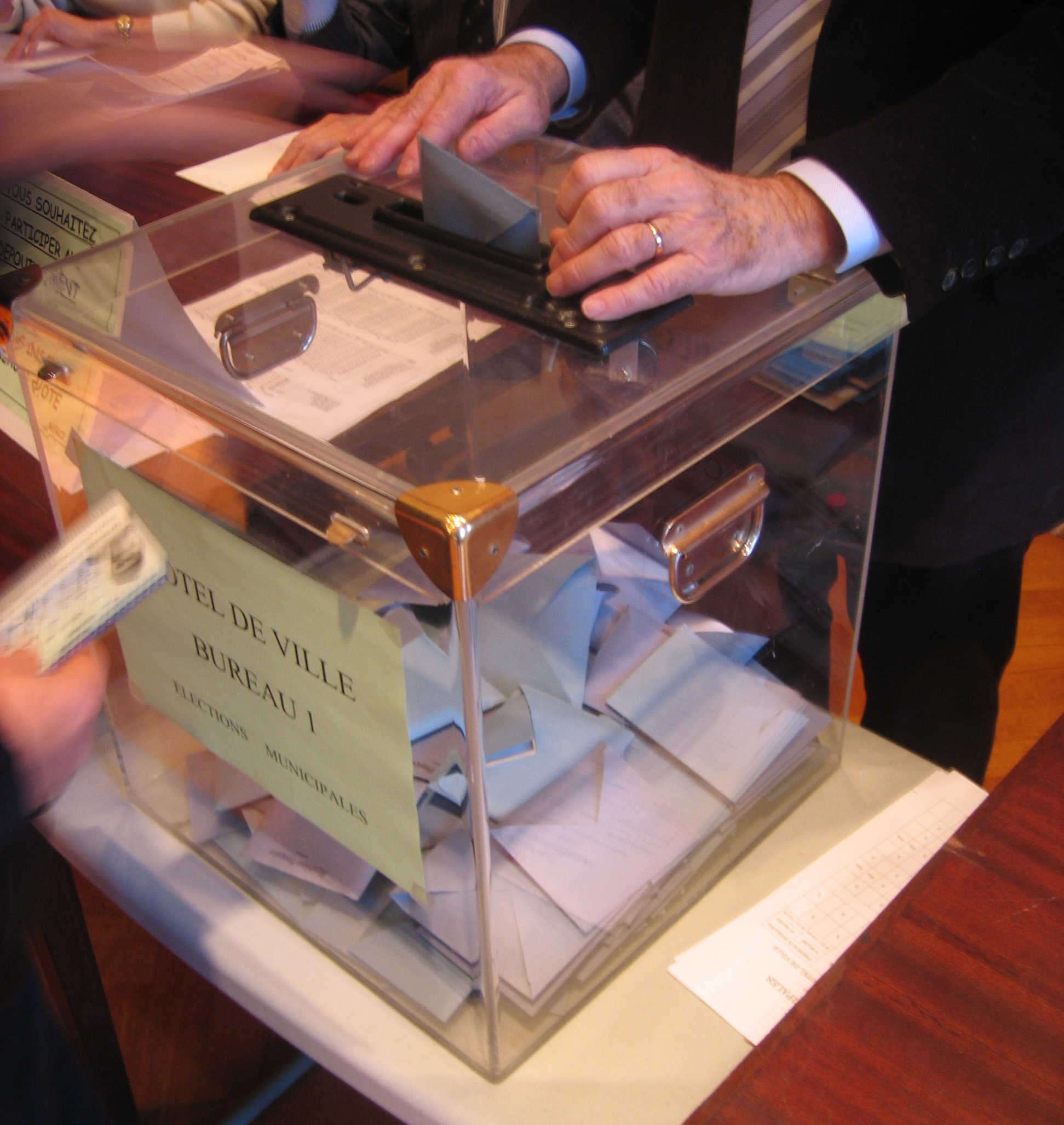 Urne en plastique transparent pour élection, France (1er tour élections municipales et cantonales 9 mars 2008 à Cognac)